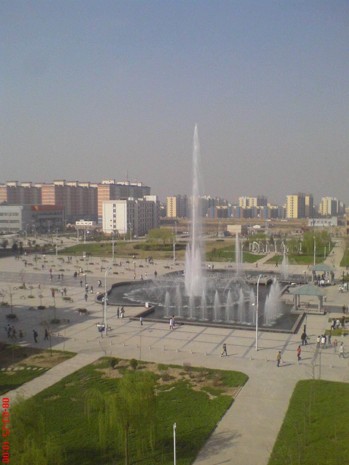 康泉